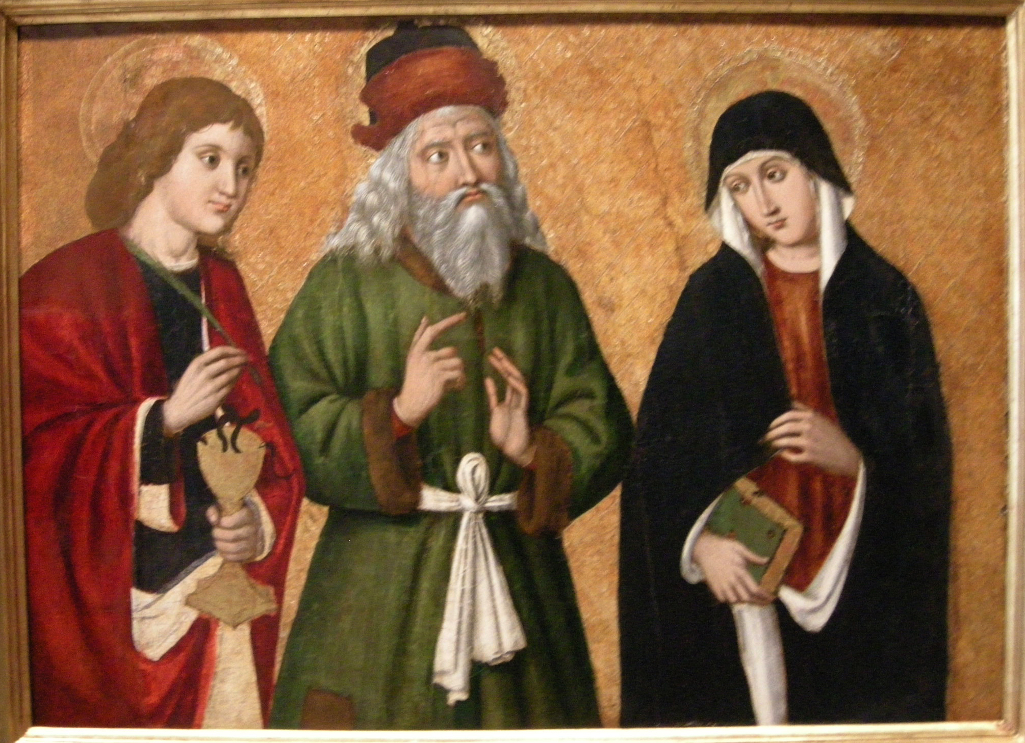 santi giovanni evangelista, zaccaria e una santatitle QS:P1476,it:"santi giovanni evangelista, zaccaria e una santa" label QS:Lit,"santi giovanni evangelista, zaccaria e una santa"